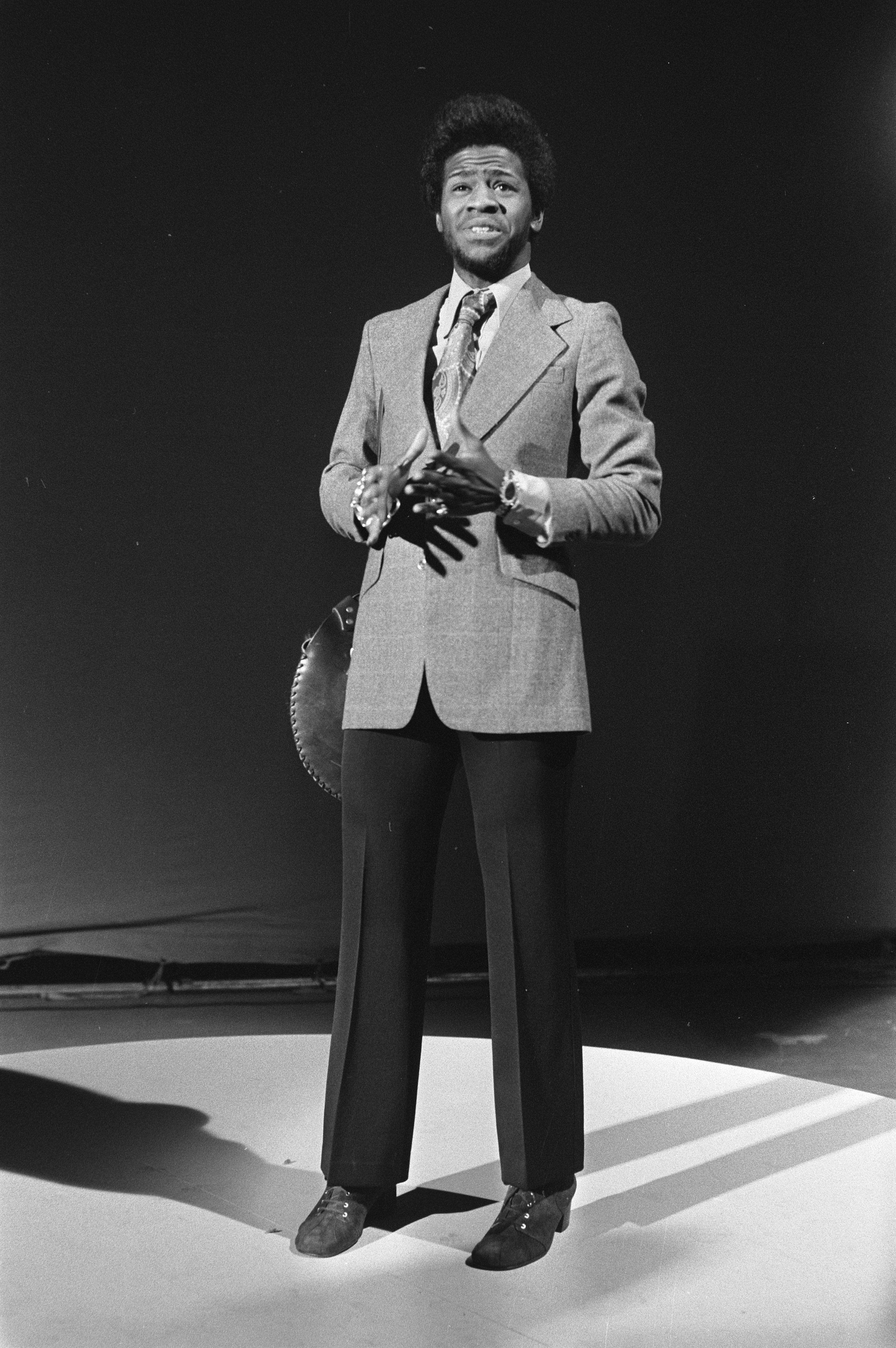 Collectie / Archief : Fotocollectie Anefo Reportage / Serie : [ onbekend ] Beschrijving : TV film NCRV: nr. 12 (l) Louis Borel in scene, nr. 4 gebr. Brouwer (musici), nr. 6 Al Green Datum : 23 december 1971 Trefwoorden : MUSICI, SCENES, filmopnames Persoonsnaam : al green Fotograaf : Punt, […] / Anefo Auteursrechthebbende : Nationaal Archief Materiaalsoort : Negatief (zwart/wit) Nummer archiefinventaris : bekijk toegang 2.24.01.05 Bestanddeelnummer : 925-2657 Reacties Geplaatst door Musiclady op 28 september 2017 - 19:42. Zanger Al Green te gast o.a. in de 'Eddy Ready Go' show.